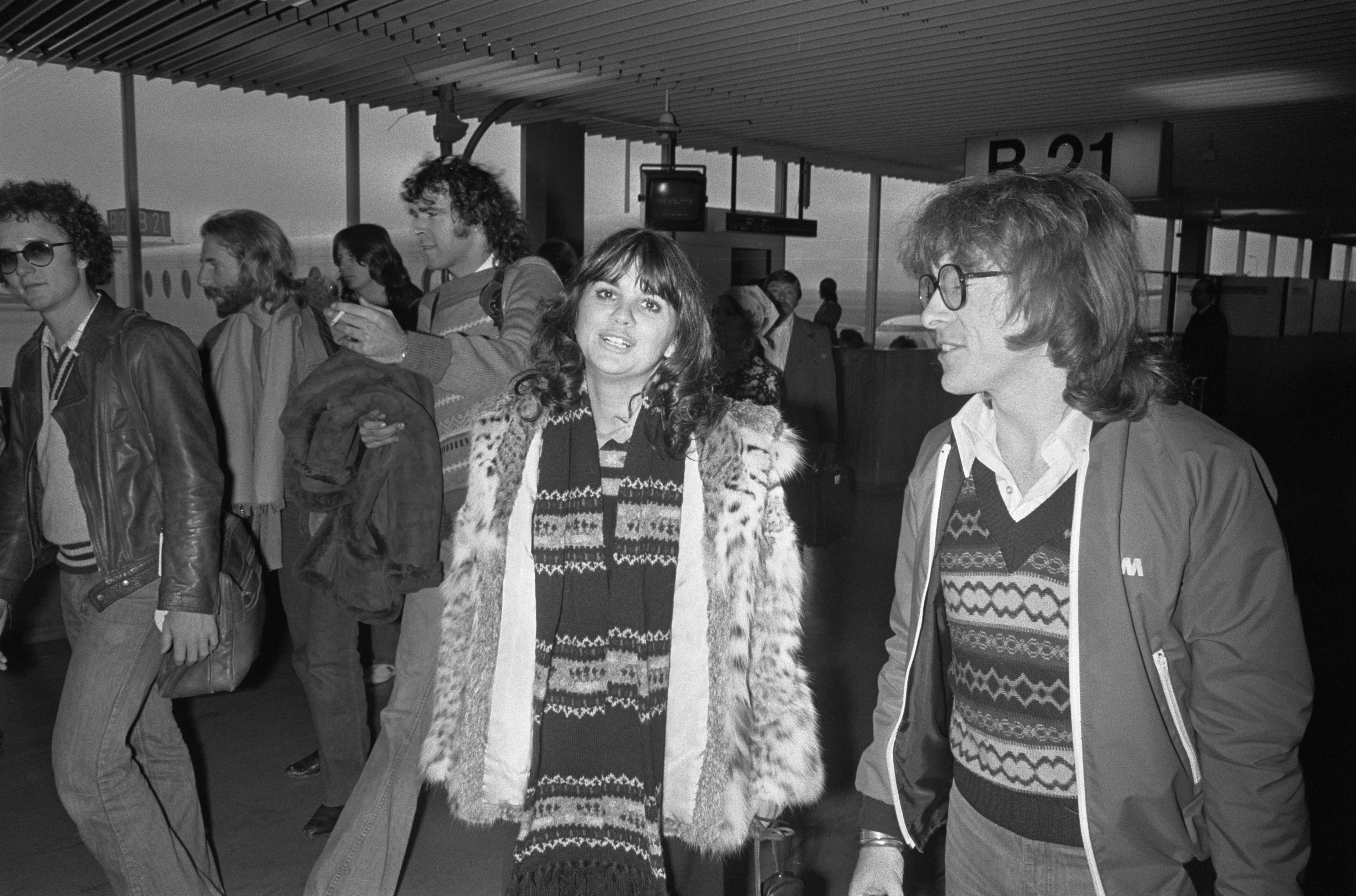 Collectie / Archief : Fotocollectie Anefo Reportage / Serie : [ onbekend ] Beschrijving : Zangeres Linda Ronstadt op Schiphol Datum : 20 november 1976 Locatie : Noord-Holland, Schiphol Trefwoorden : zangeressen Fotograaf : Bogaerts, Rob / Anefo Auteursrechthebbende : Nationaal Archief Materiaalsoort : Negatief (zwart/wit) Nummer archiefinventaris : bekijk toegang 2.24.01.05 Bestanddeelnummer : 928-8976